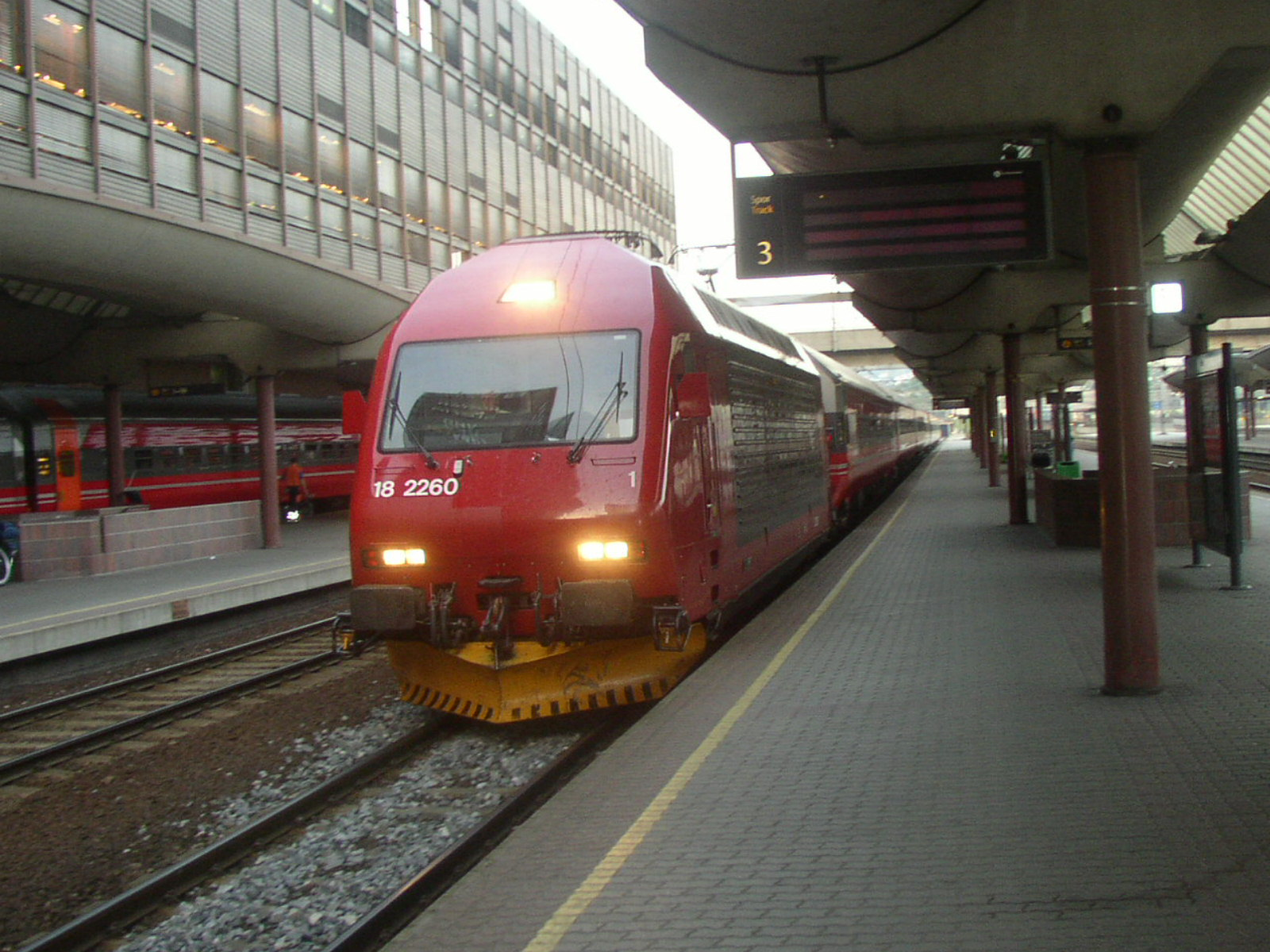 Locomotive norvégienne dans la gare d'Oslo, le 24/07/06.